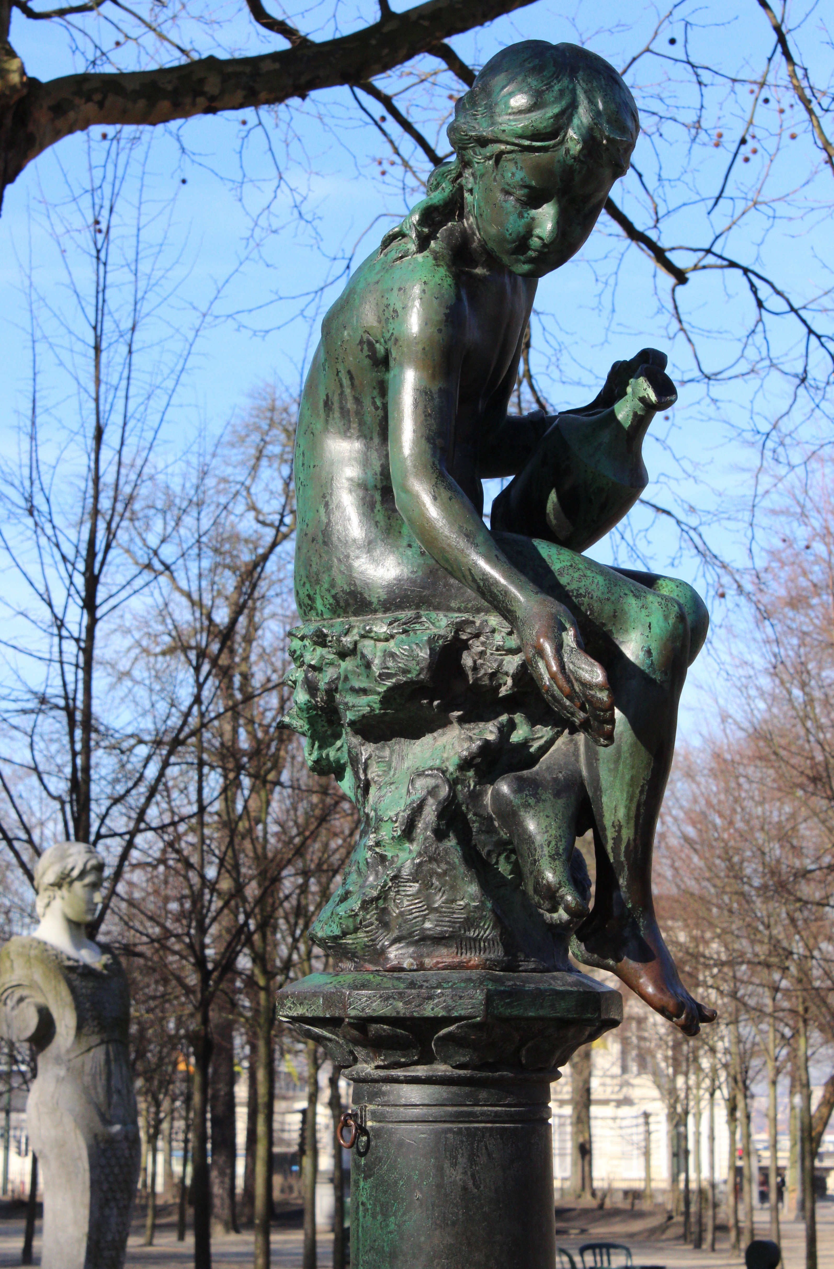 Enfrant offrant à boire (1901), statue d'Alphonse De Tombay près du bassin octogone du par de Bruxelles